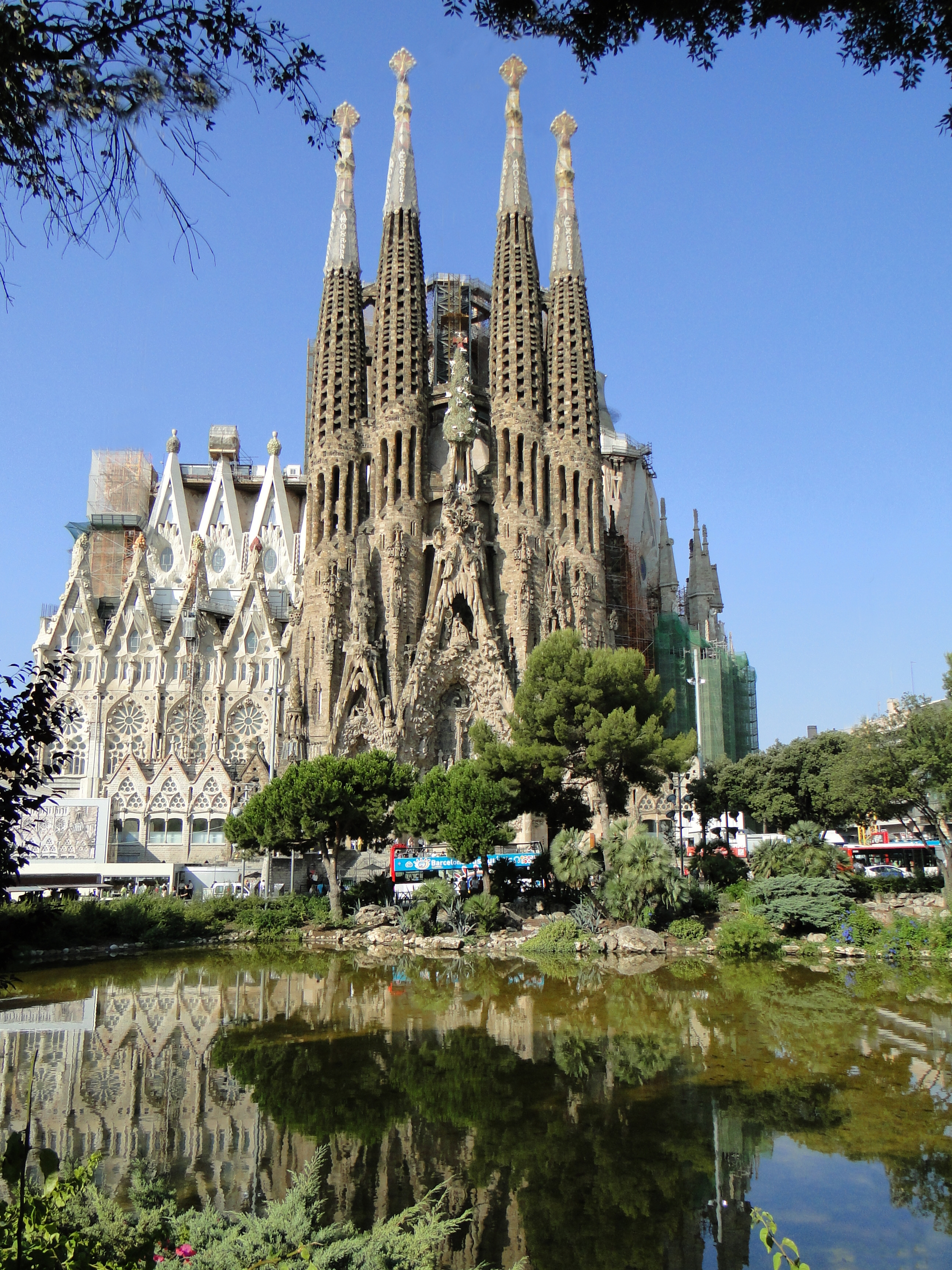 Sagrada Família, Plaça de Gaudí, Barcelona